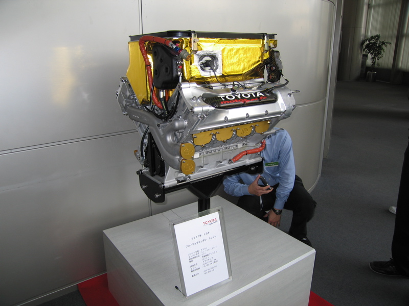 Formula Nippon series.